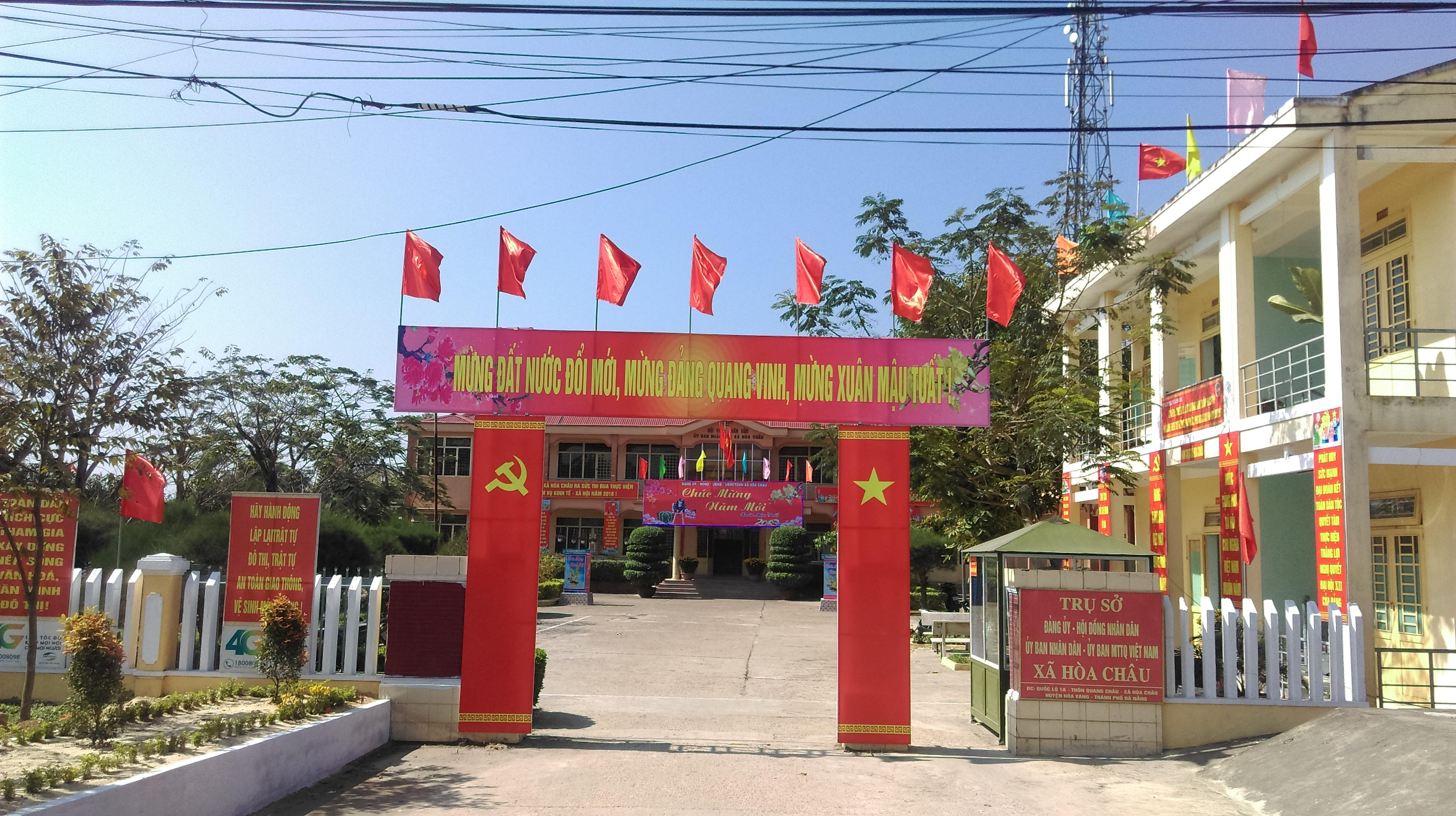 UBND xã Hòa Châu, Hòa Vang, Đà Nẵng